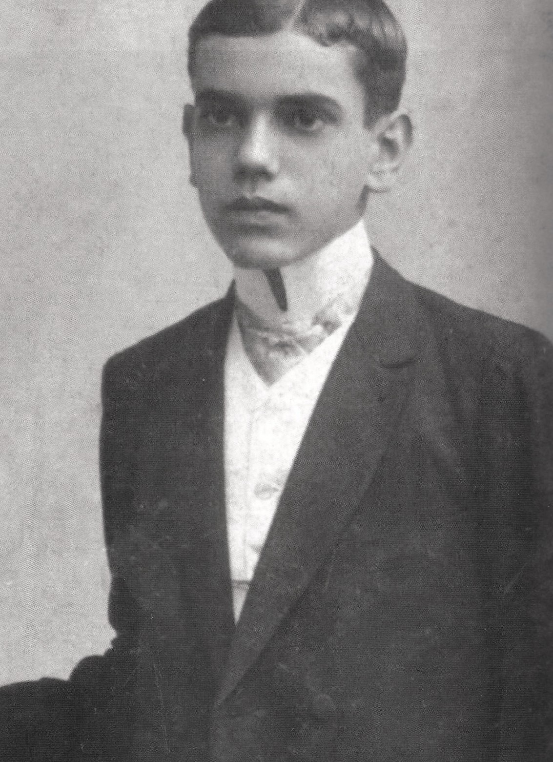 Ruiz Cortines (1889-1973) político mexicano, presidente de México en el periodo de 1952-1958, a los diez años de edad.